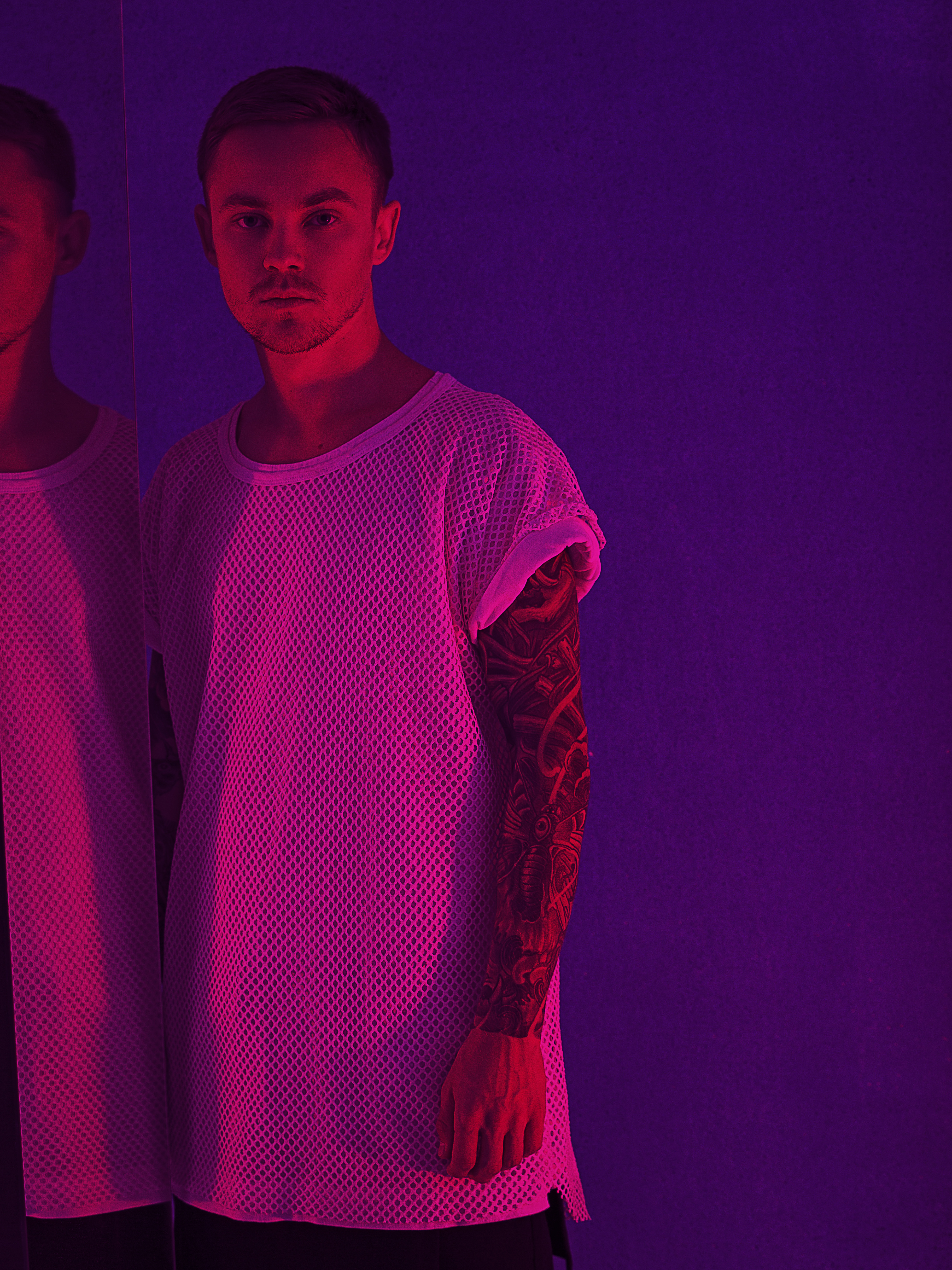 Съемки клипа на песню "На глубине"